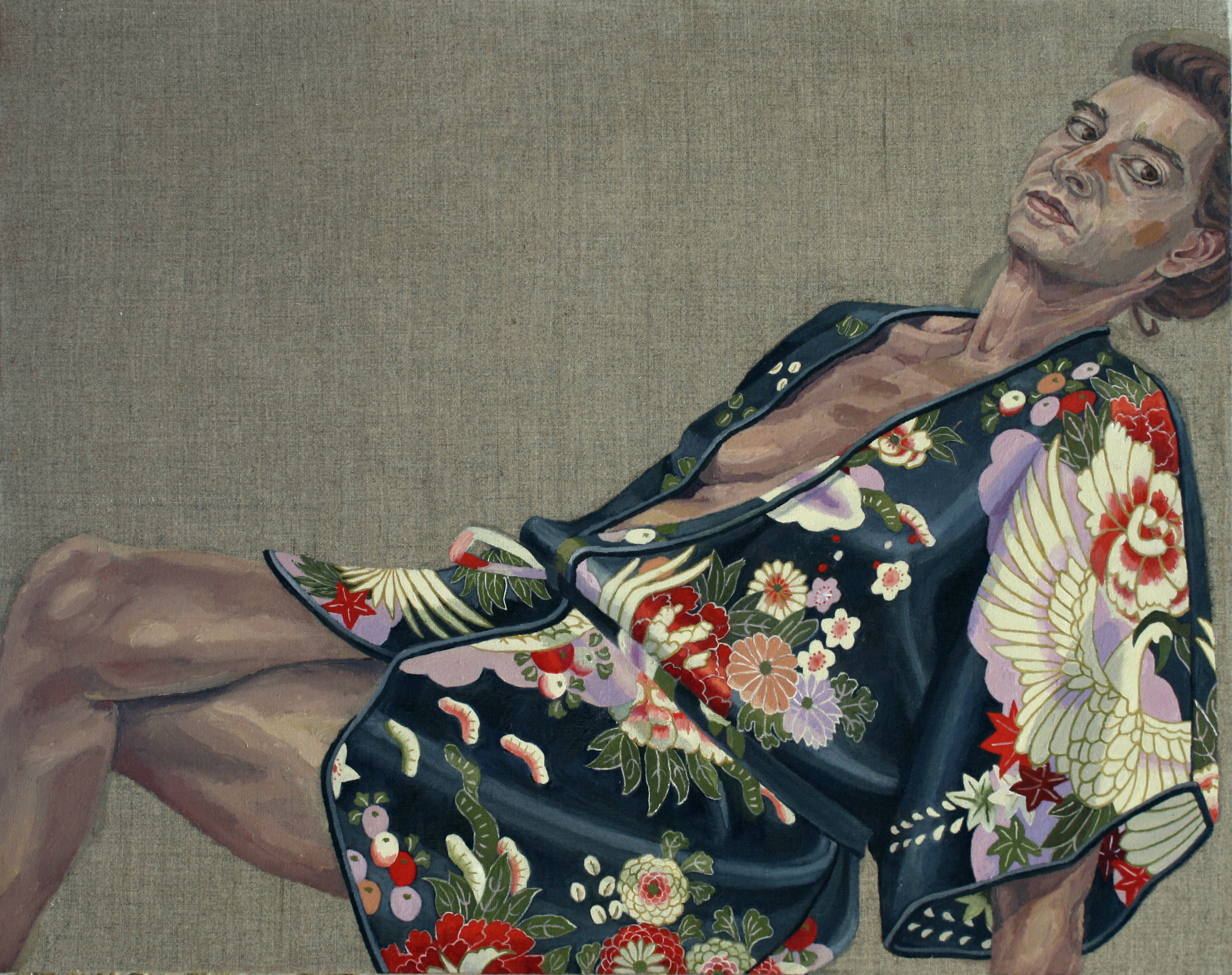 Nomi Tannhauser, Kimono